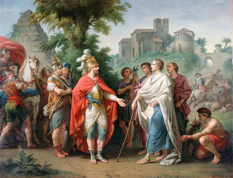 Popilius envoyé en ambassade auprès d'Antiochus Epiphane pour arrêter le cours de ses ravages en Egypte